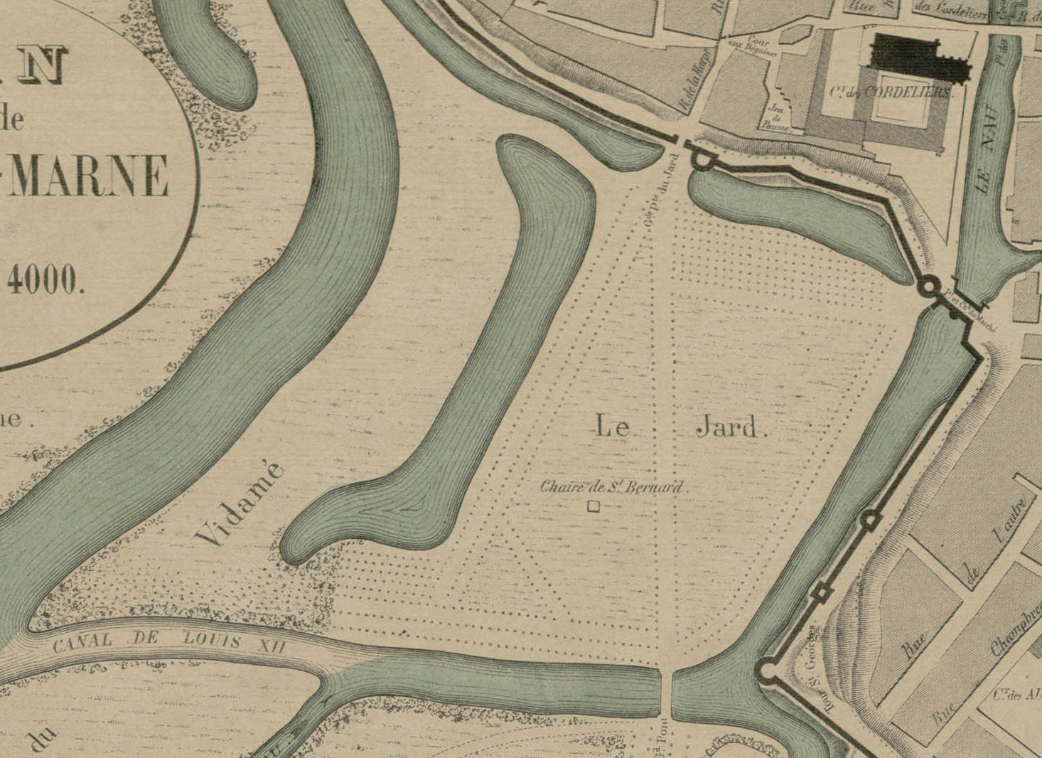 vue partille de la carte de chalons de 1755biliothèque pompidou de Châlons ES 17602 1.